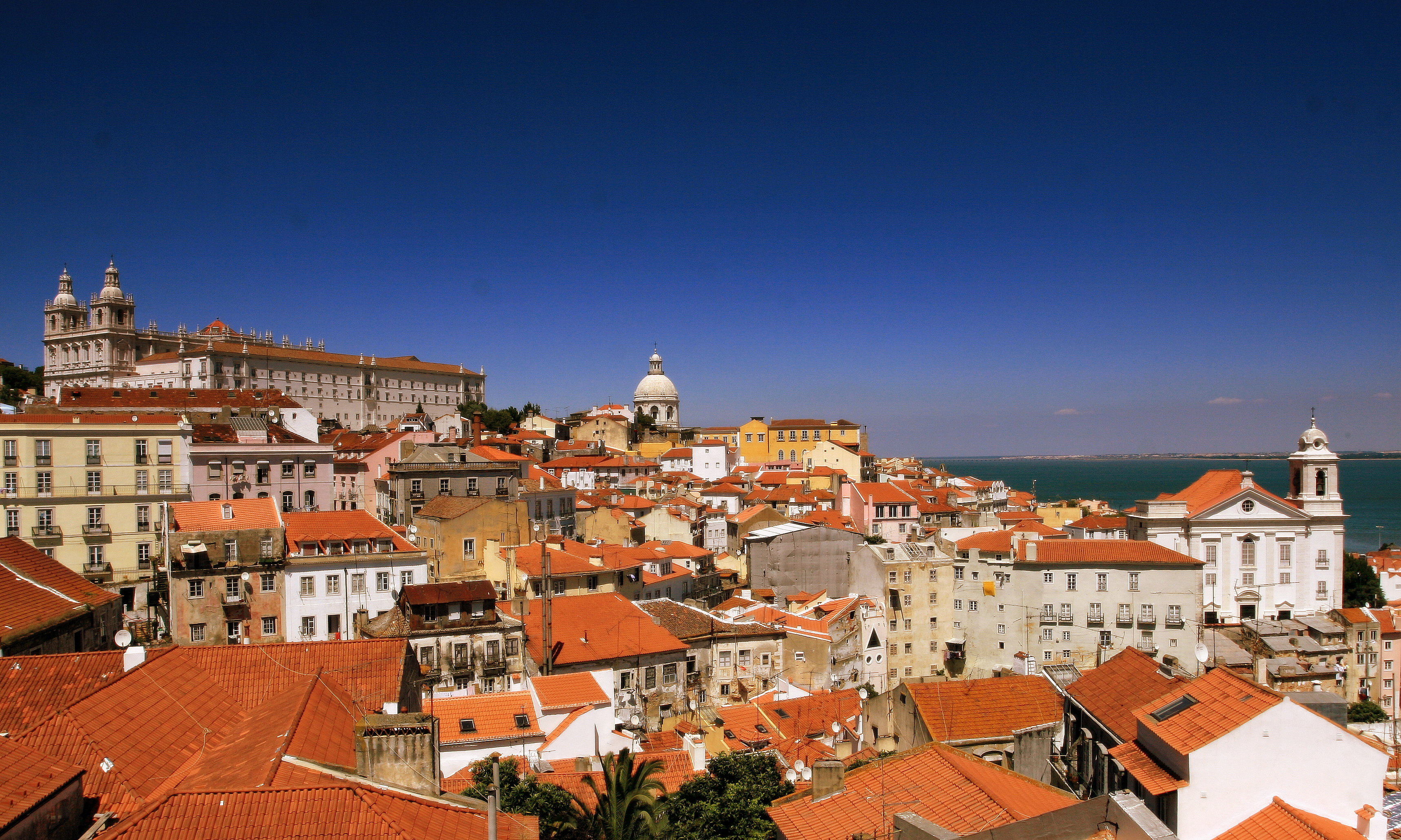 São Vicente de Fora, Santa Engrácia, e Santo Estêvão